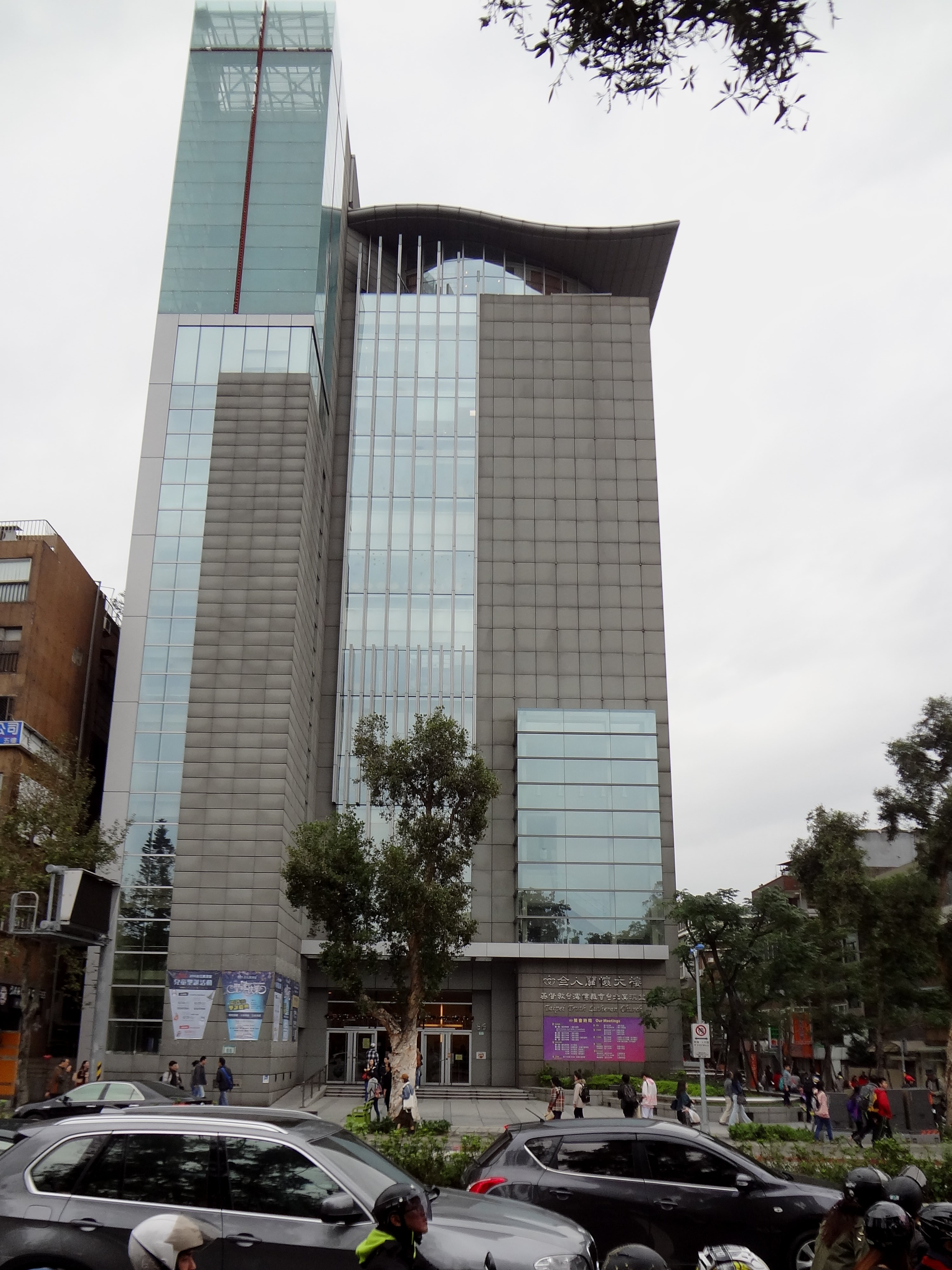 基督教台灣信義會台北真理堂，位於臺北市大安區新生南路三段86號。